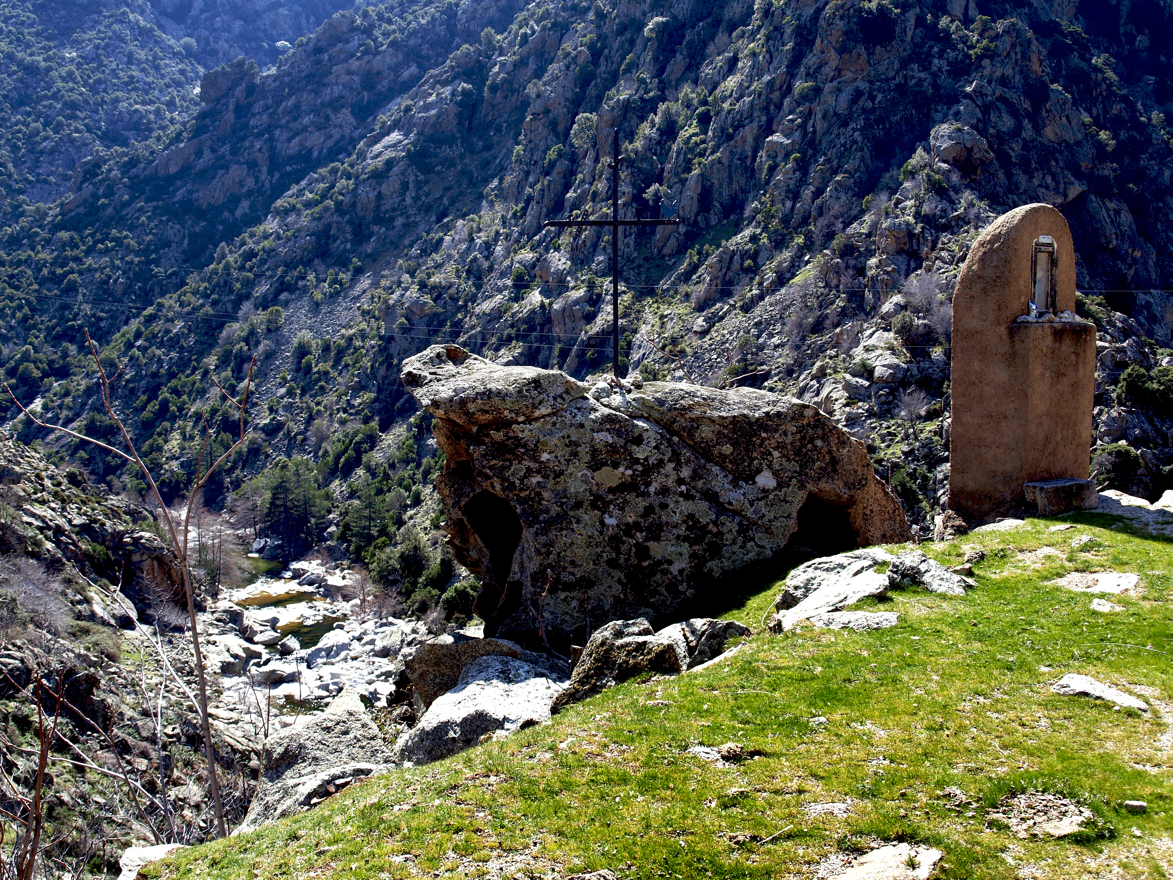 Corscia, Niolo (Haute-Corse) - L'oratoire dédié à la Vierge au début du remarquable défilé de la Scala di Santa Regina, route D84. Sur la gauche, le Golo.